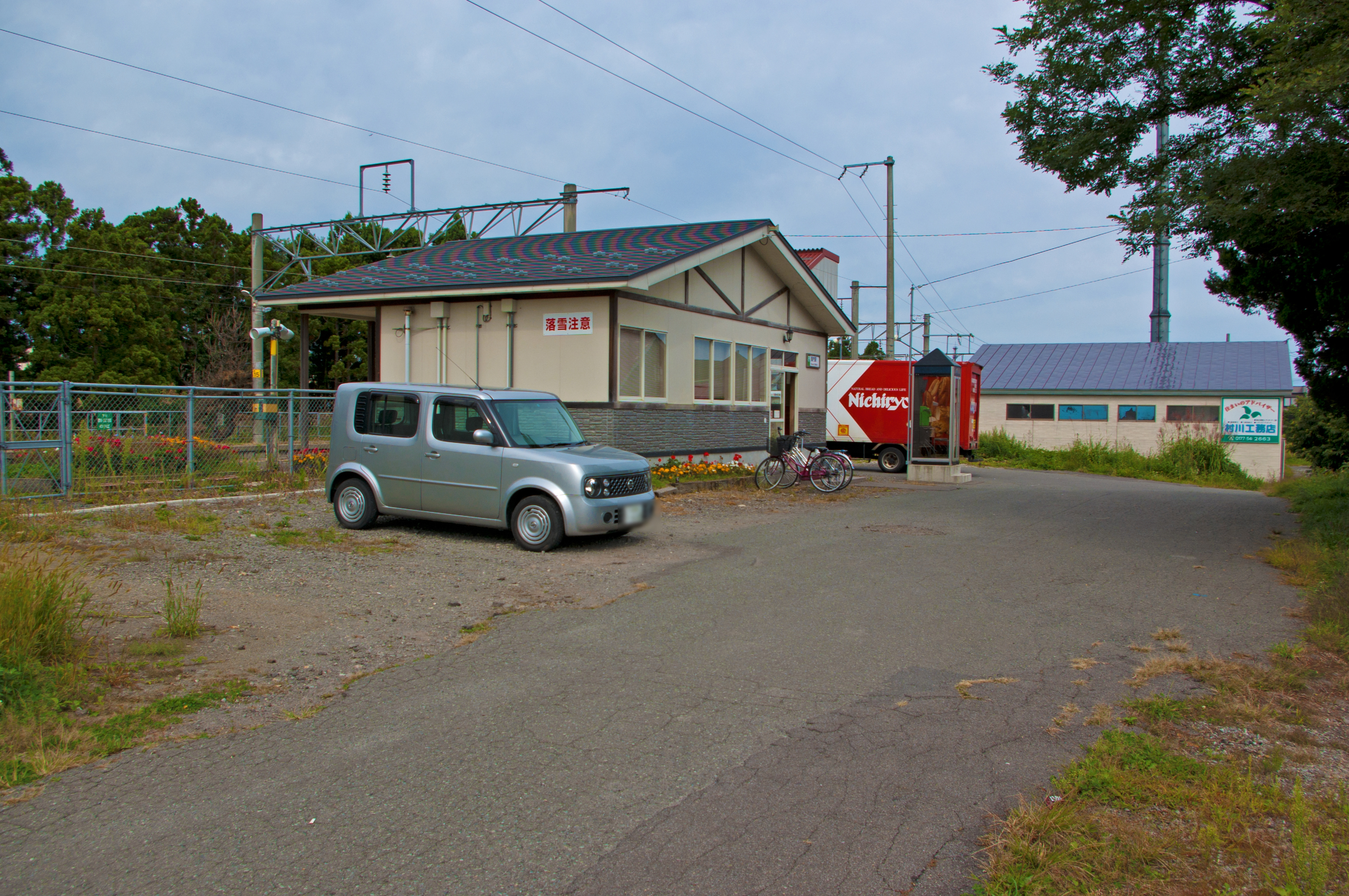 東日本旅客鉄道津軽線奥内駅